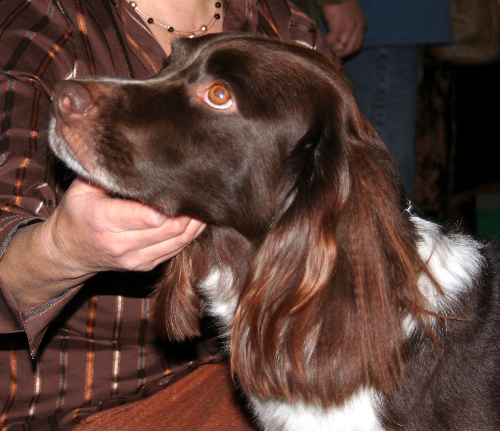 Mały_munsterlander na Światowej Wystawie Psów Rasowych w Poznaniu